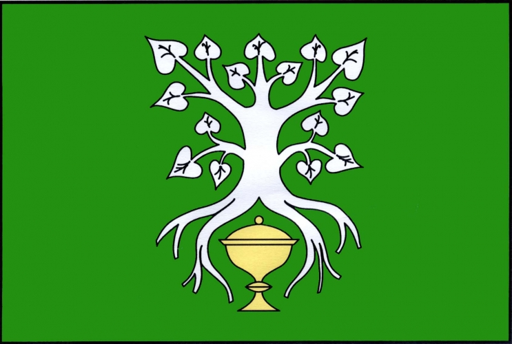 vlajka, Šebkovice, okres Třebíč